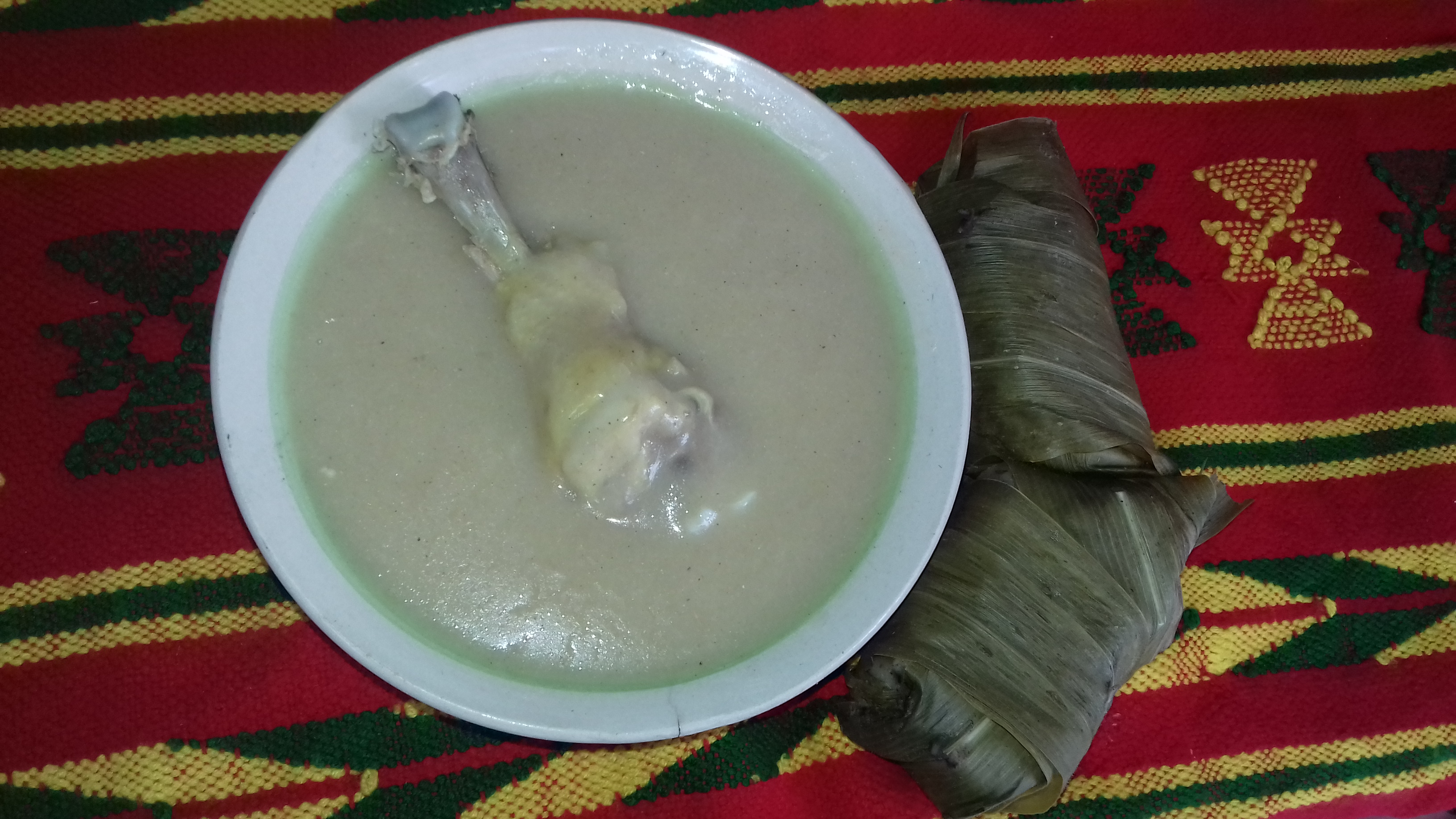 Comida Típica que se consume para las pedidas, bodas, cumpleaños o graduaciones